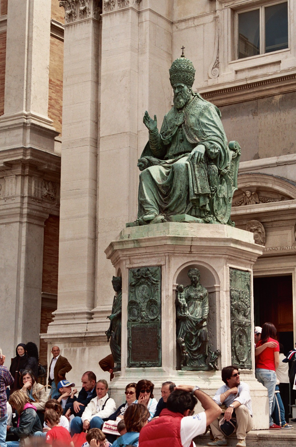 Manumento bronzeo a papa Sisto V a Loreto.